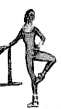 Retiré or Passé position in ballet